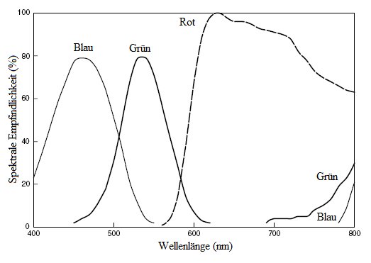 Spekrale Empfindlichkeit einers CCD-Zeile